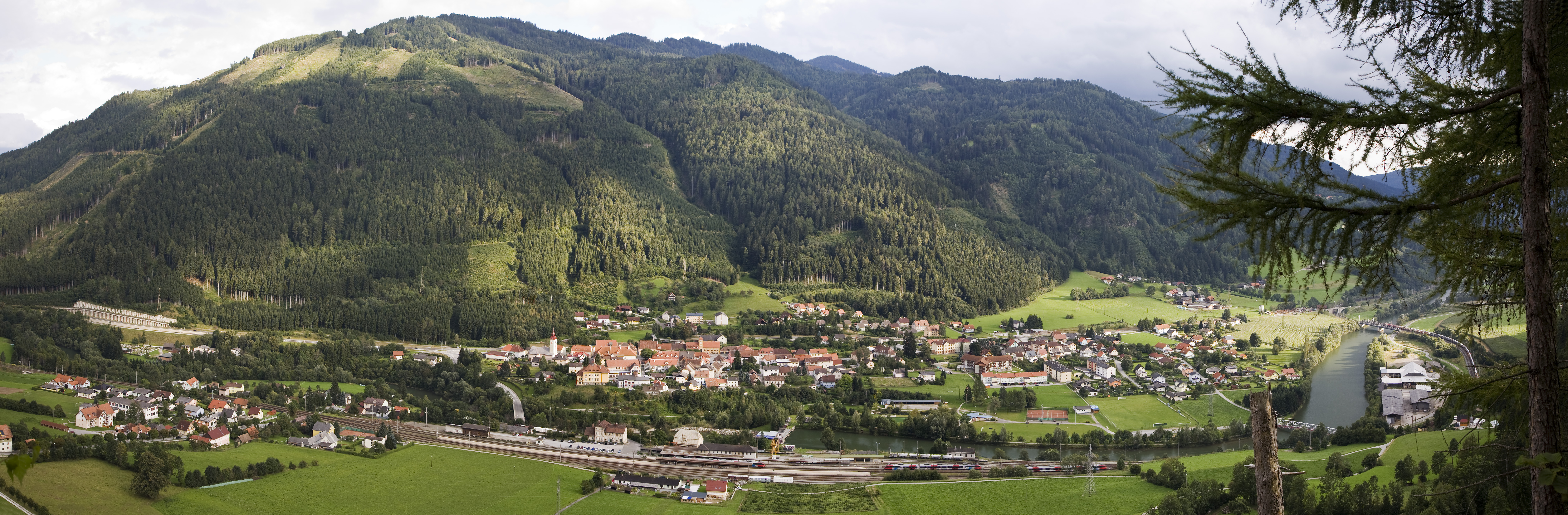 Blick von der Burgruine Frauenburg auf die Ortschaft Unzmarkt